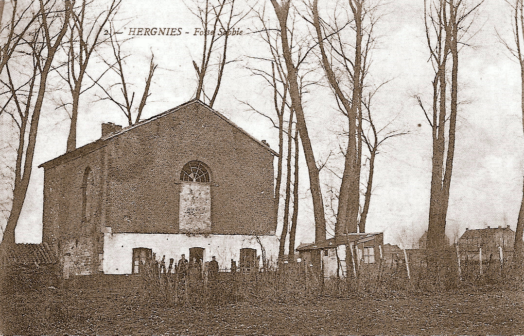 La fosse Sophie de la Compagnie des mines d'Anzin était un charbonnage du bassin minier du Nord-Pas-de-Calais constitué d'un seul puits situé à Hergnies, Nord, Nord-Pas-de-Calais, France. La fosse Sophie est inscrite sur la liste du patrimoine mondial par l'Unesco le 30 juin 2012 et y constitue en partie le site no 5.